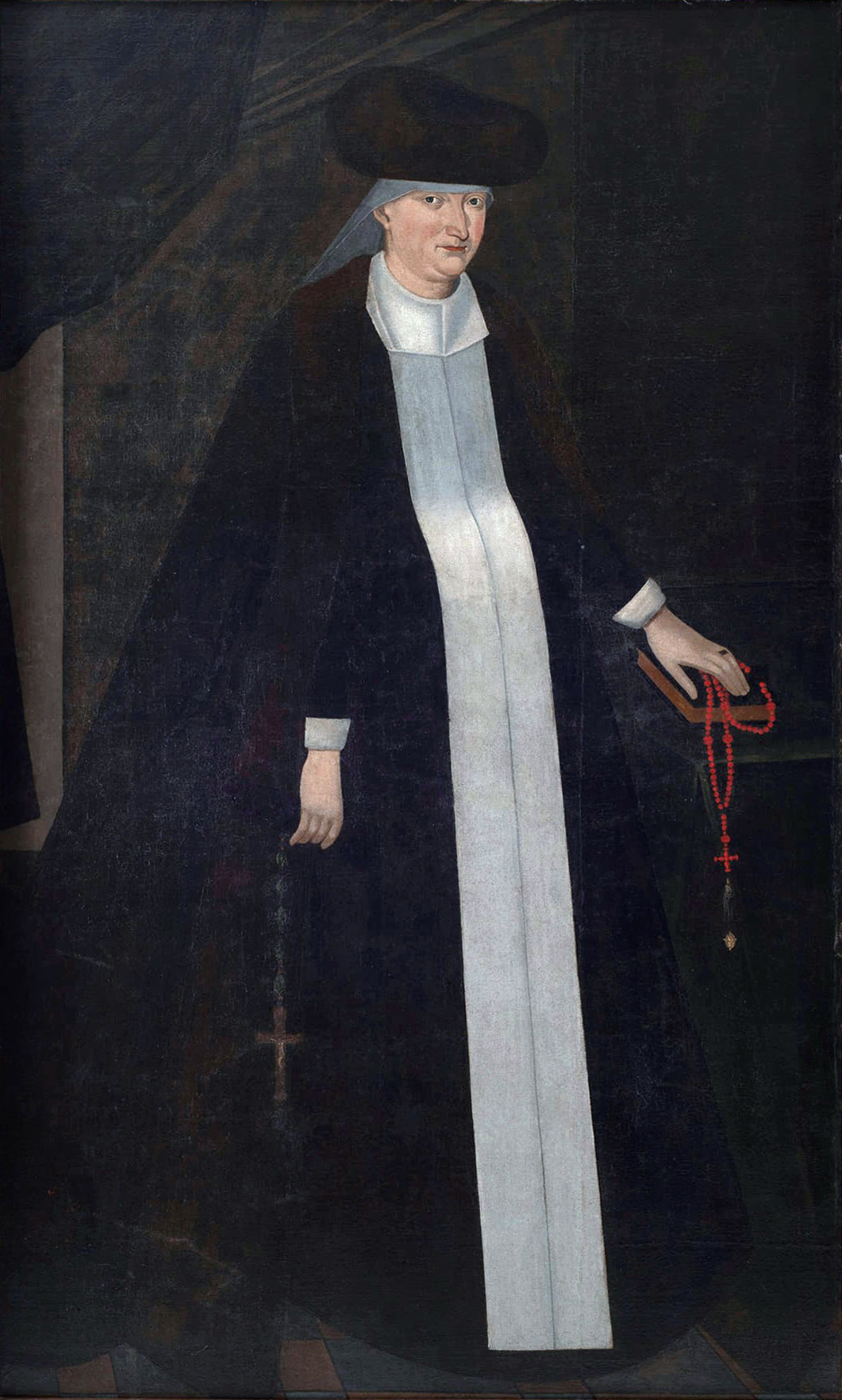 Беларуская (тарашкевіца): Партрэт Ганны Астроскай (Hanna Astroskaja) з роду Косткаў (Kostka)